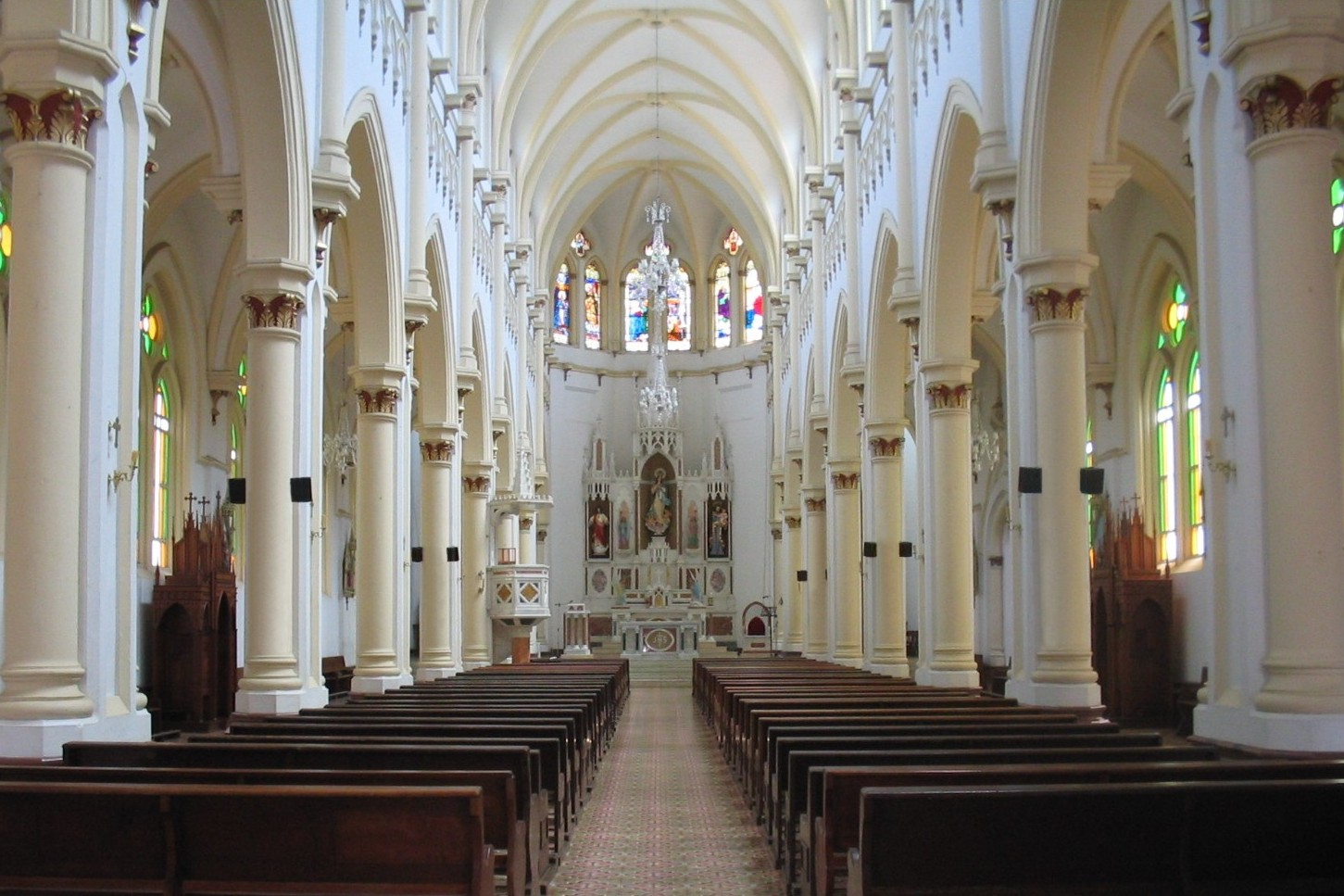 Interior de la Iglesia de Caramanta, Antioquia, Colombia